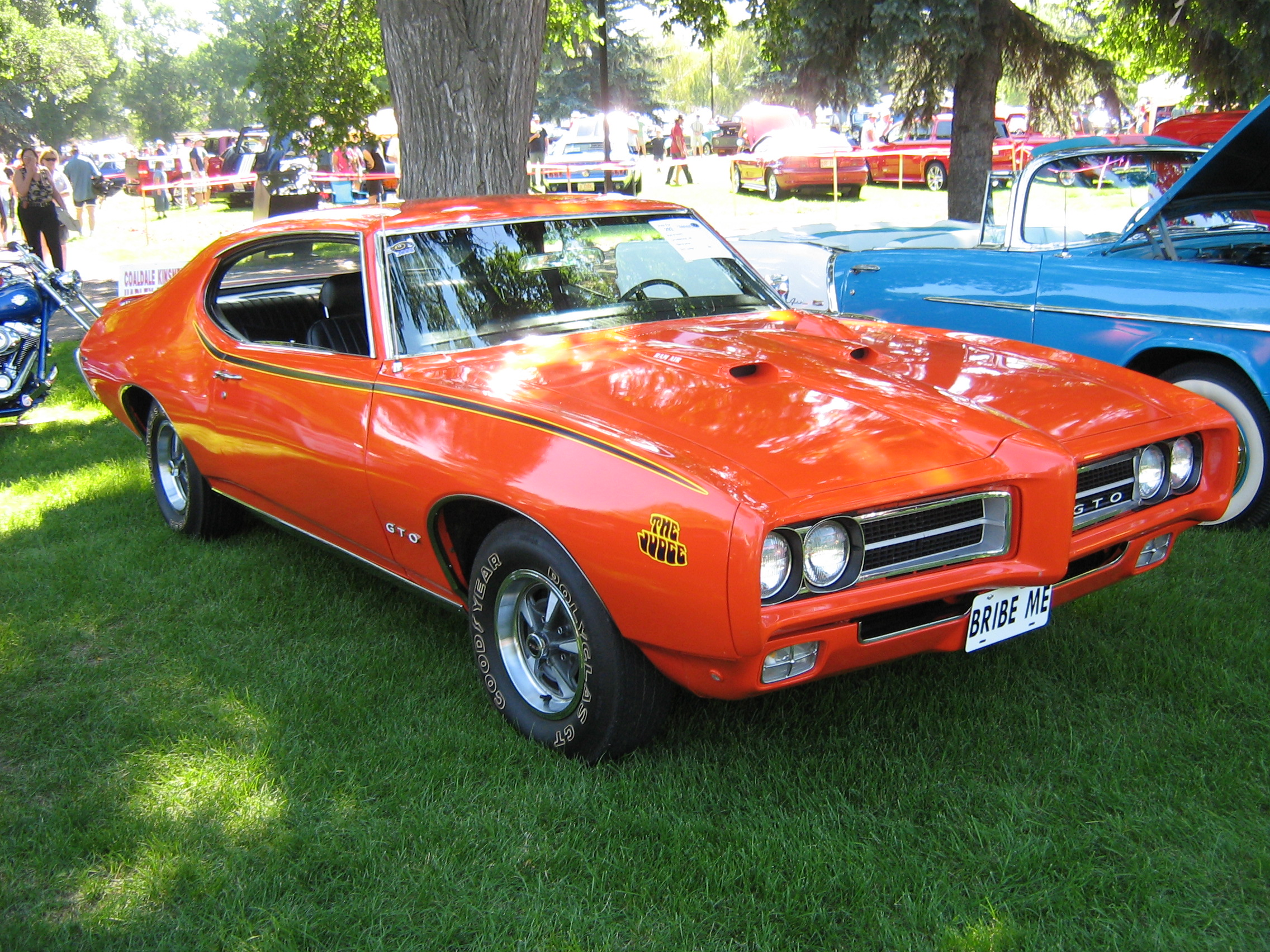 Pontiac GTO